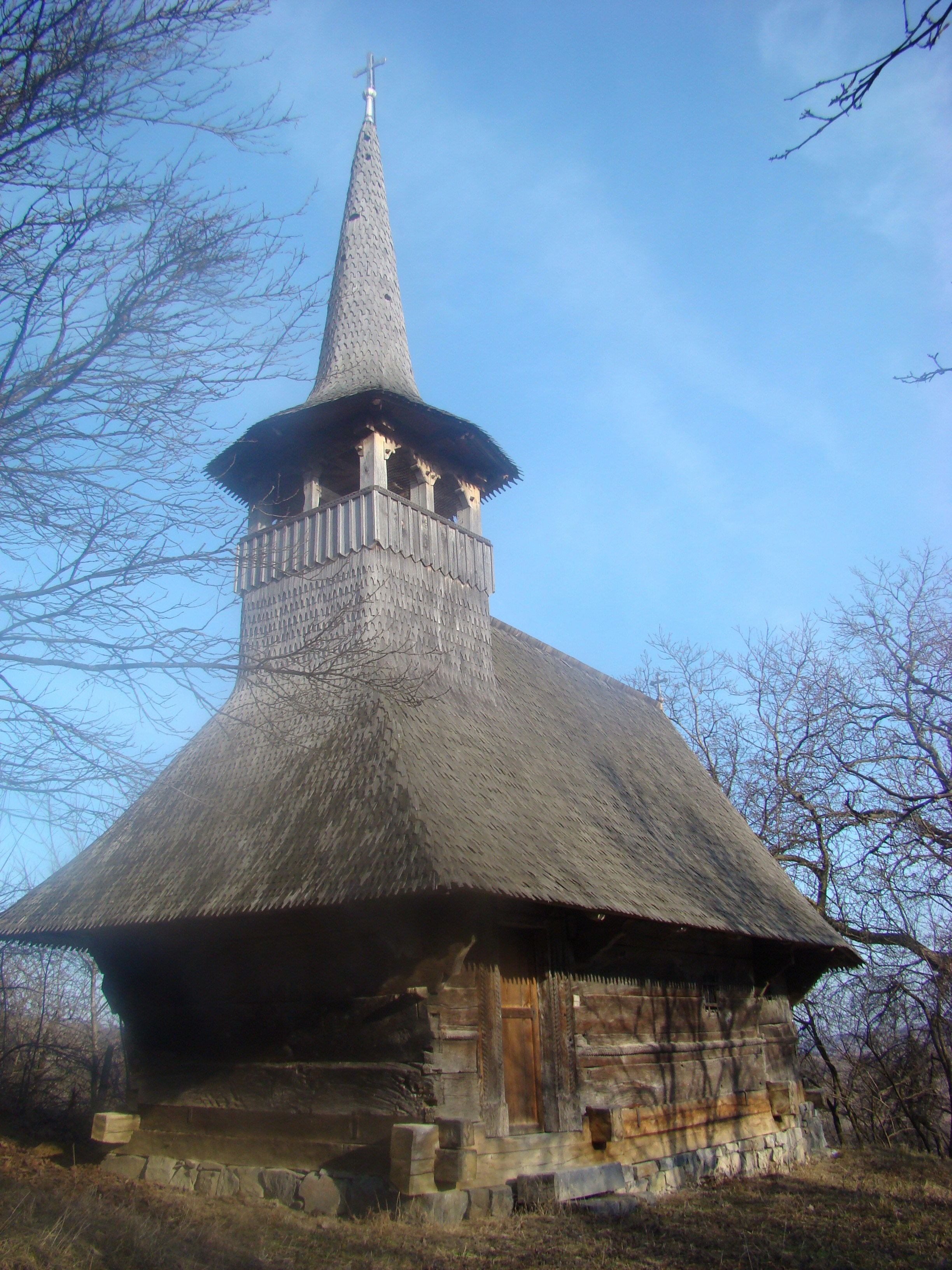 Biserica de lemn „Sf.Arhangheli” din Doba Mică, Sălaj